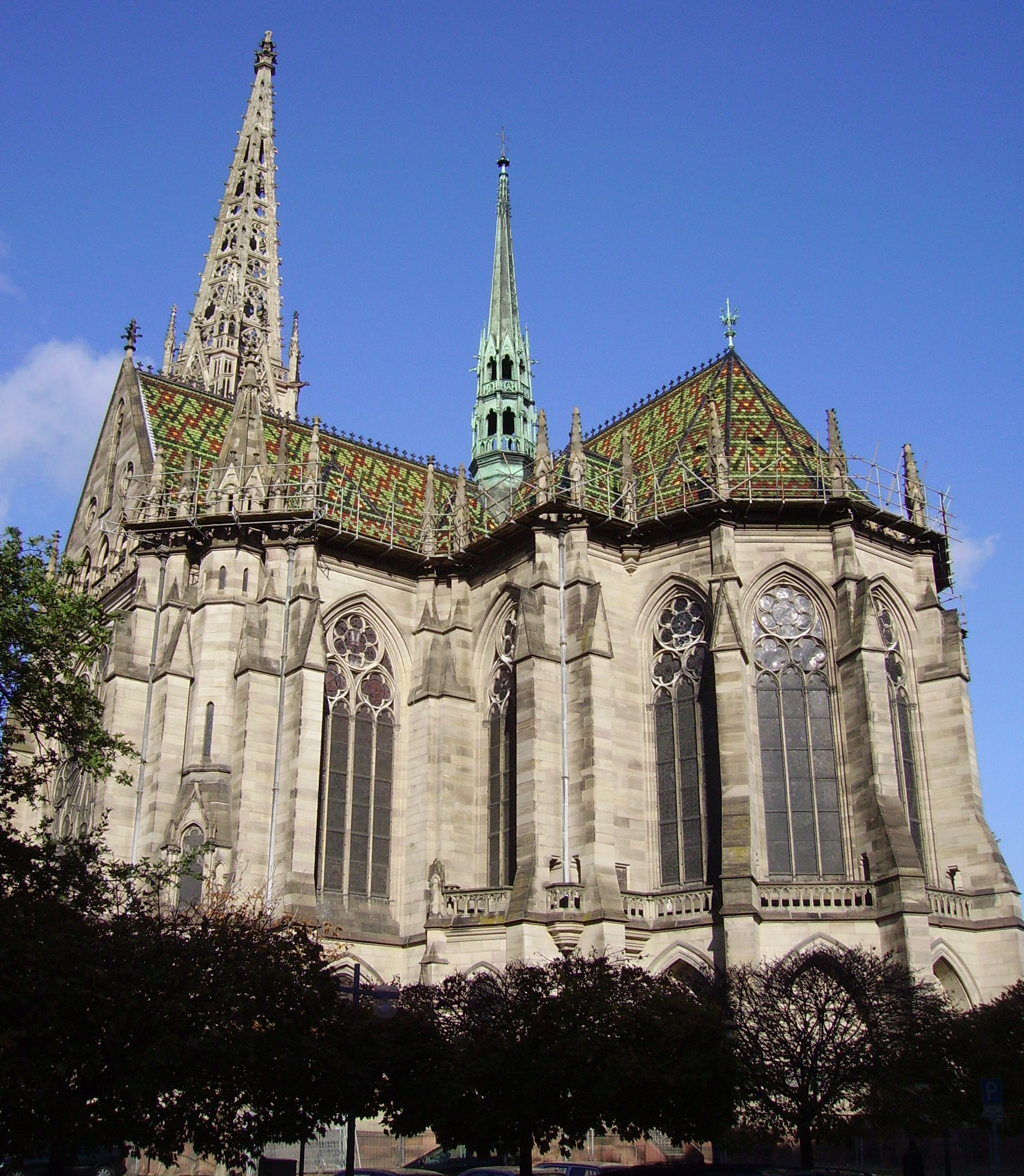 Gedächtniskirche (Memorial Church) in Speyer, Germany